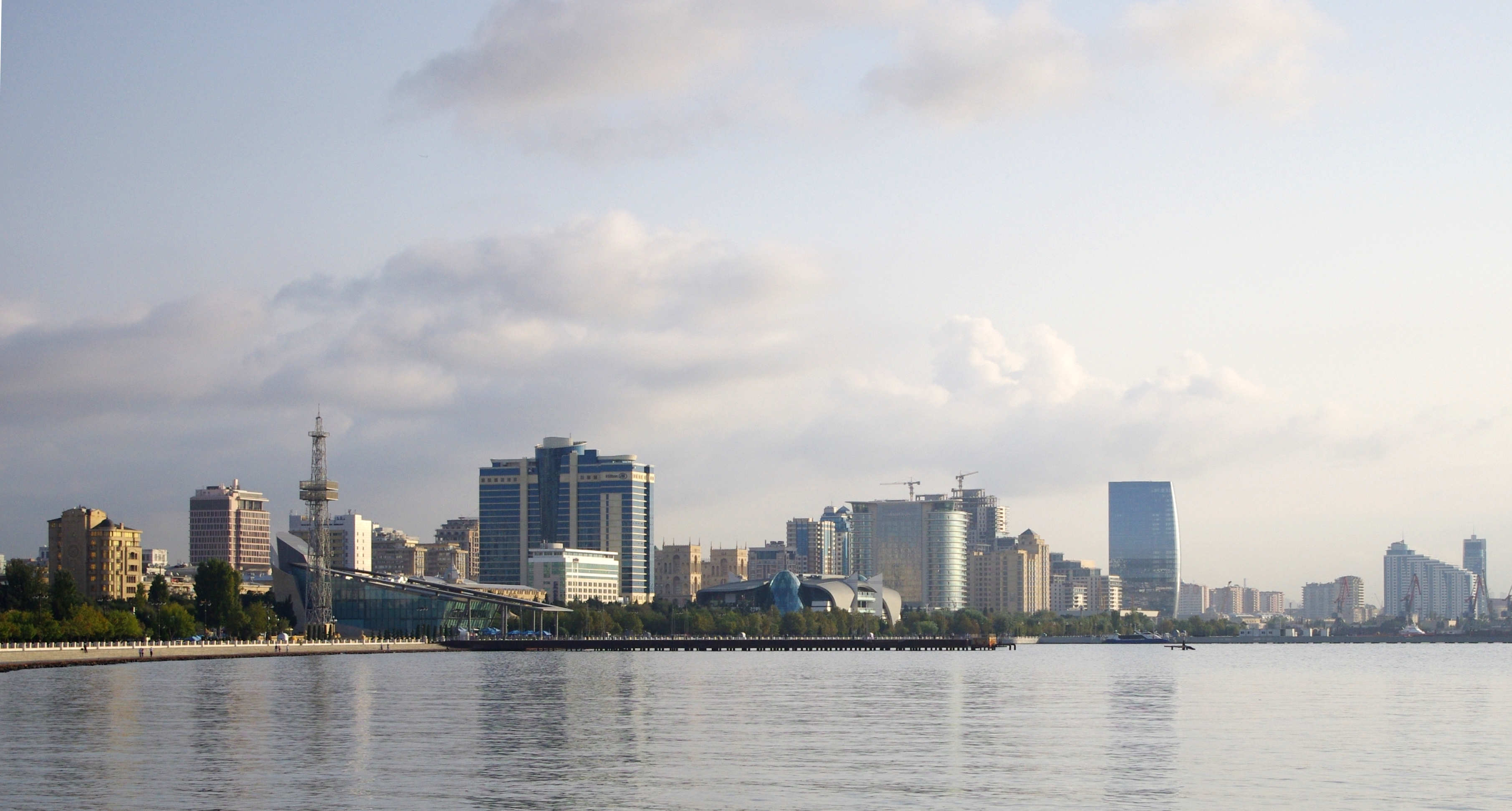 Вид на бульвар. Утро